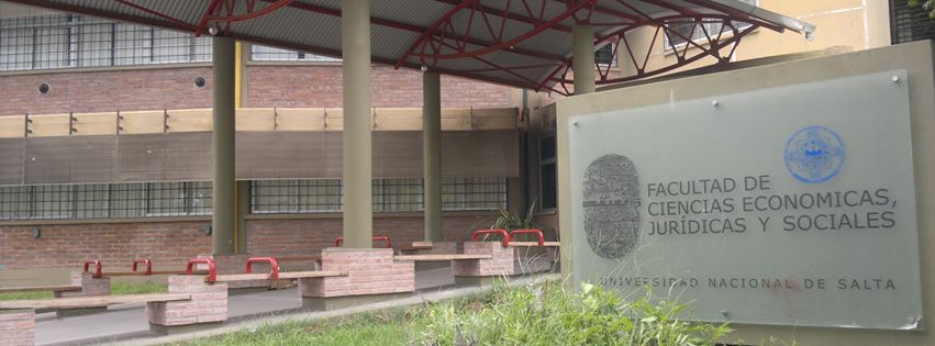 Entrada Principal